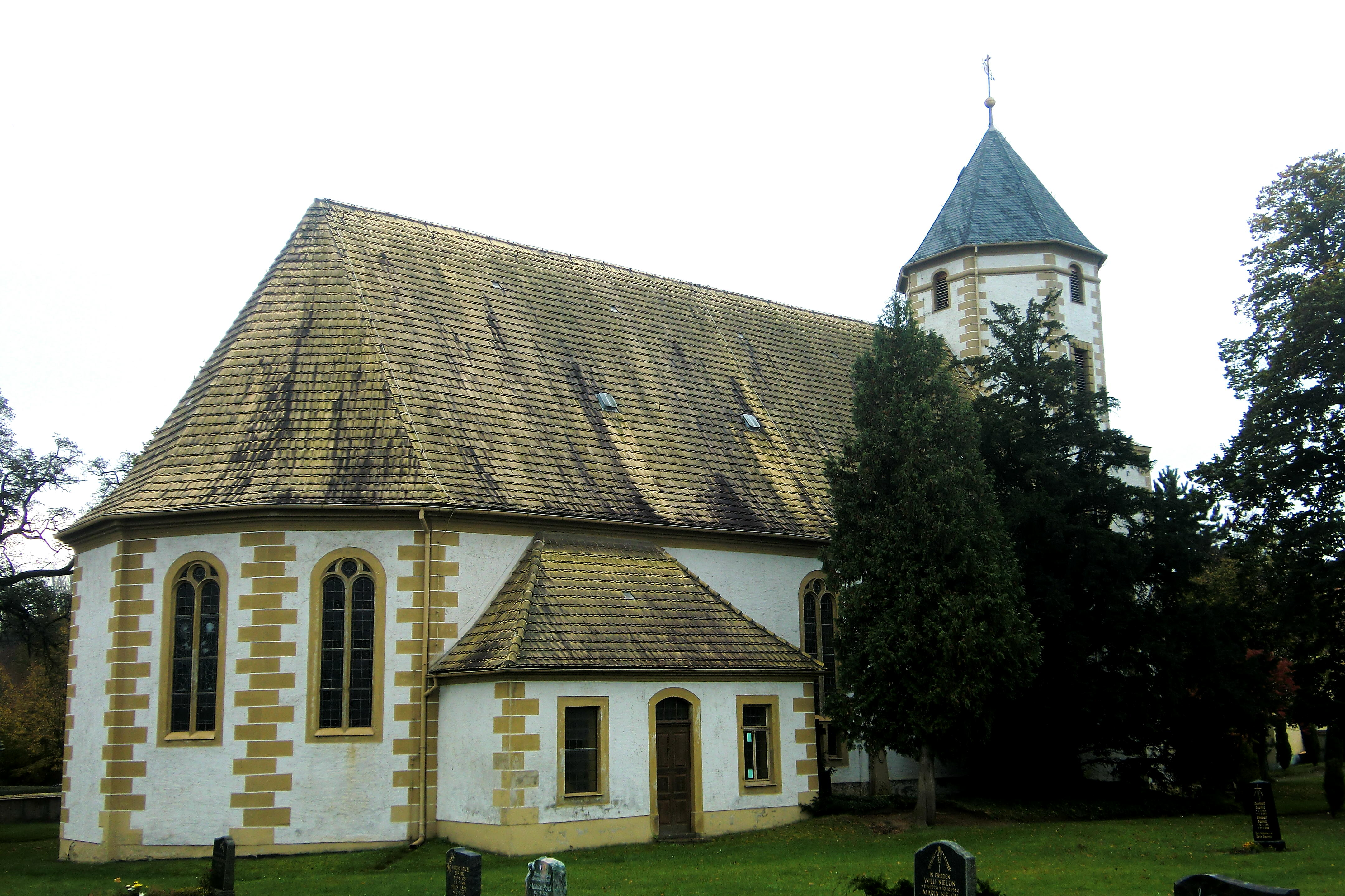 Kirche Borna (Gemeinde Liebschützberg)